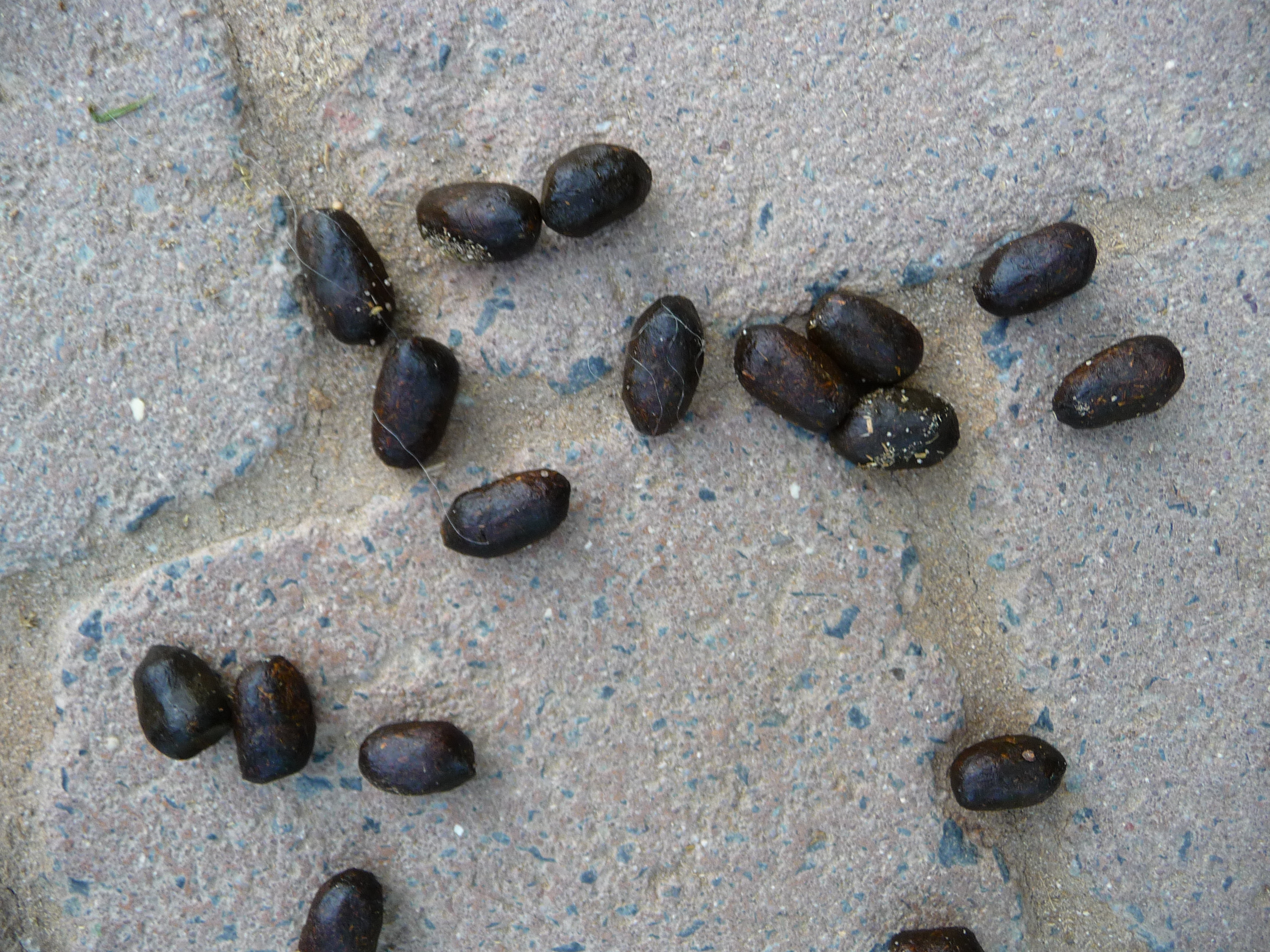 Kot afrikanischer Zwergziegen